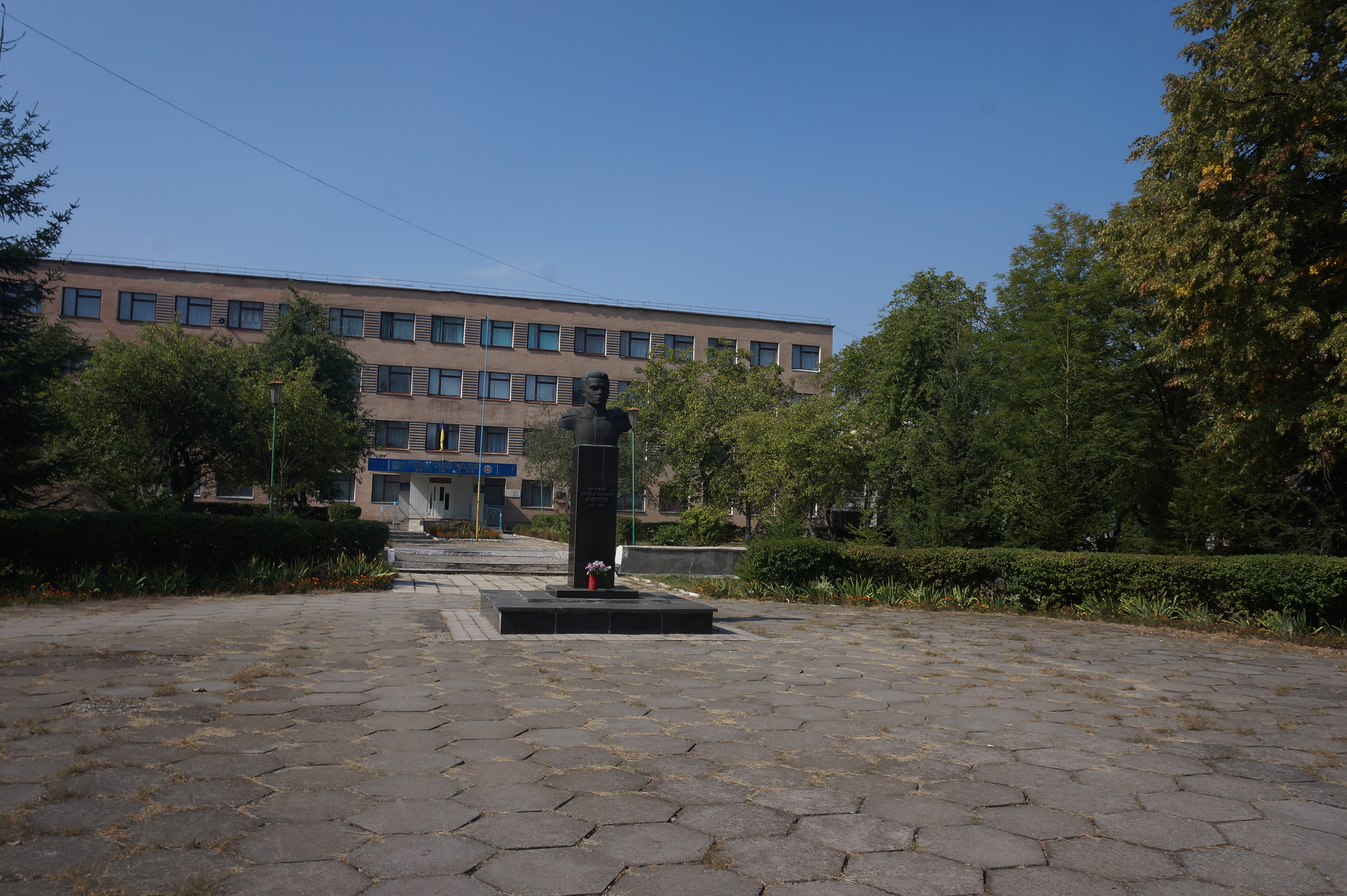 Пам'ятник Герою Радянського Союзу М. О. Худякову, Волочиськ, вул. Фрідріхівська, 2а